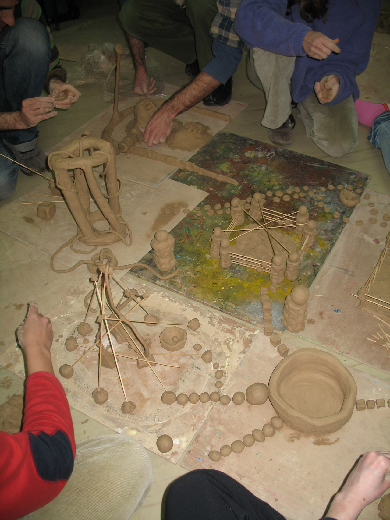 טיפול באמנות בקבוצה. עבודה משותפת בחלל אחד